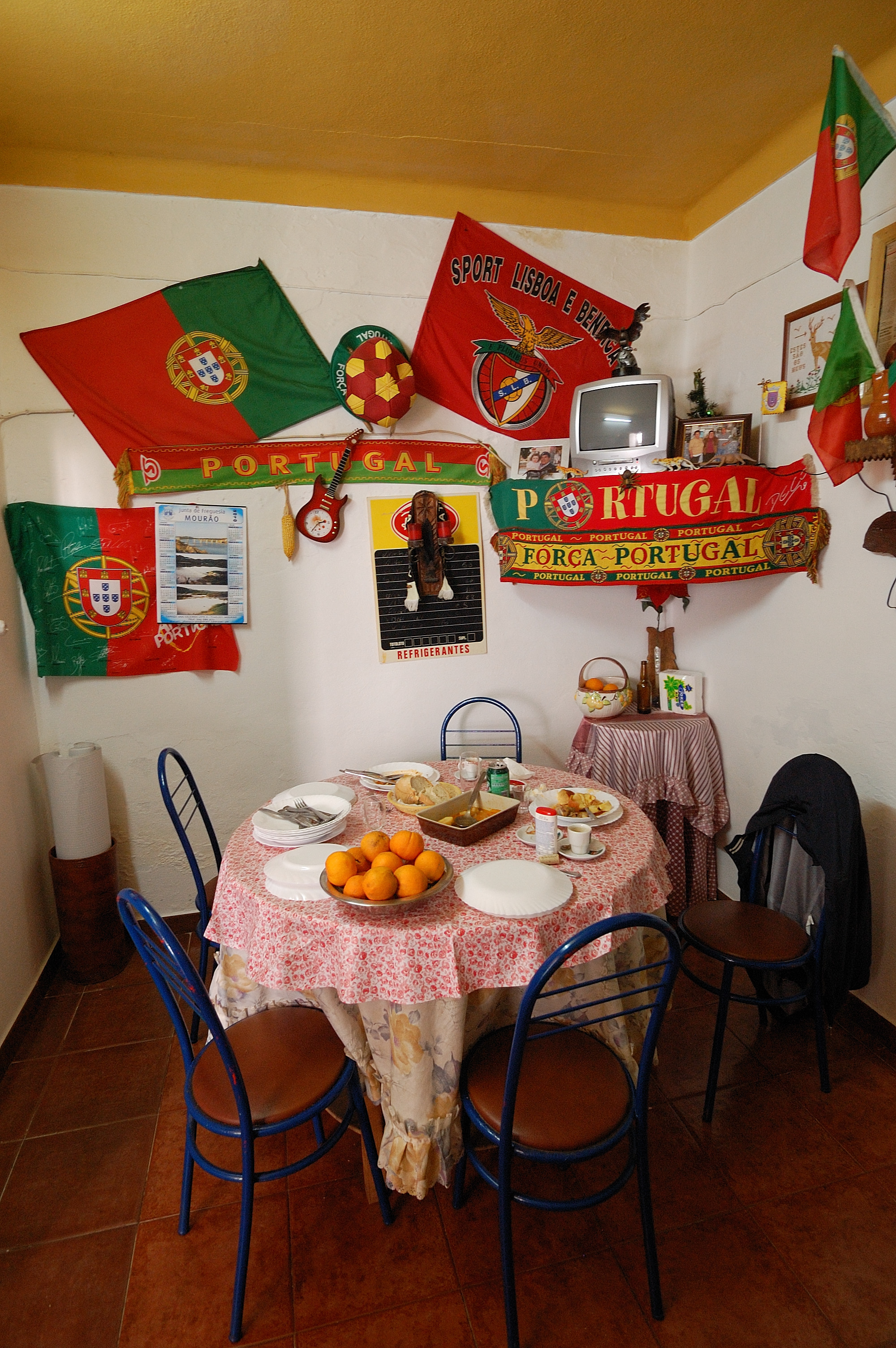 Mina do Bugalho, Portugal [2011]